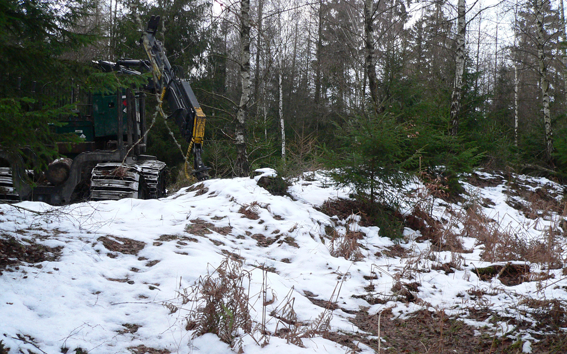 Wall des Kring mit Walldurchstich durch Forstweg, darauf Holzvollernter